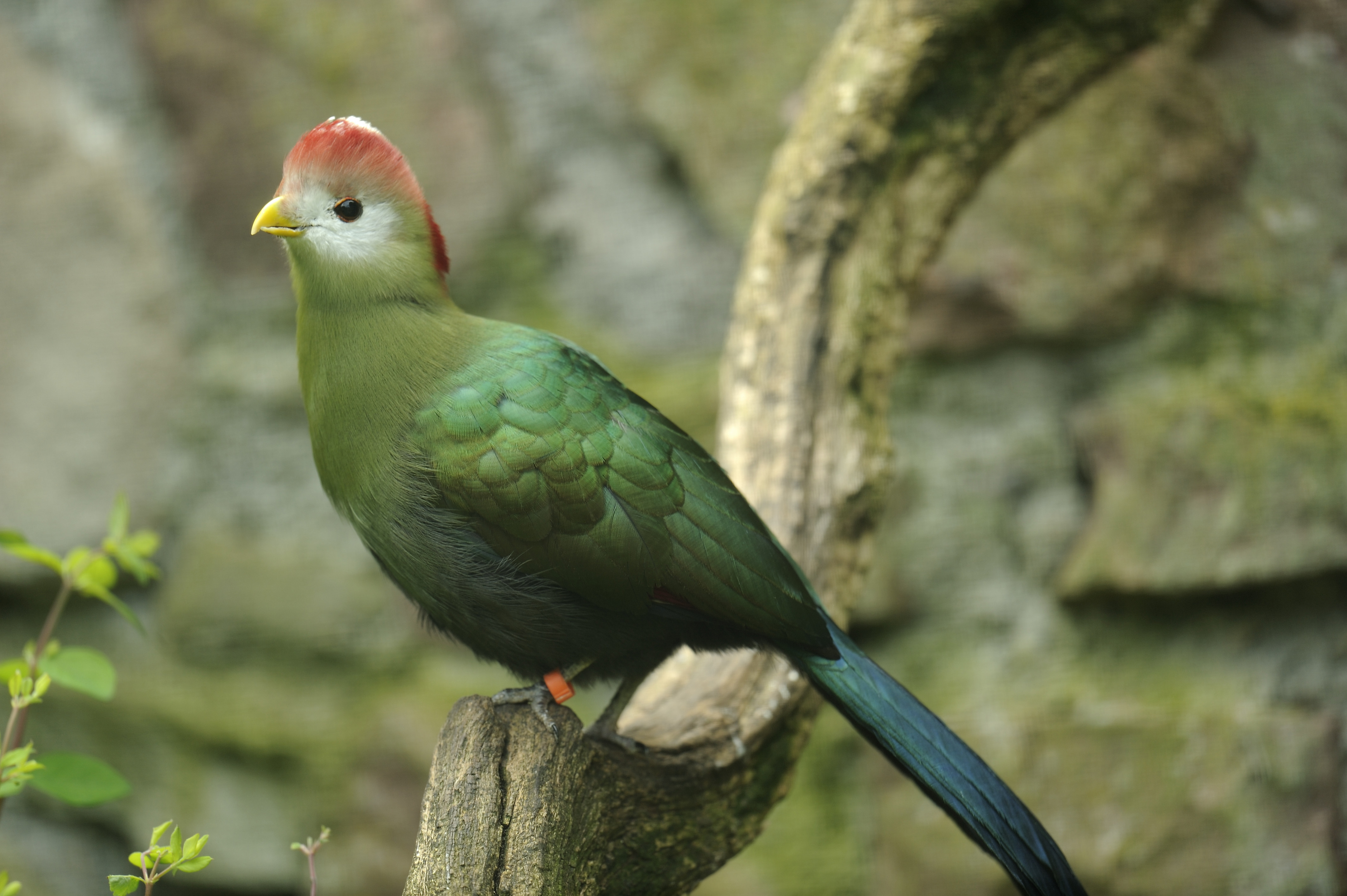 Touraco de fischer